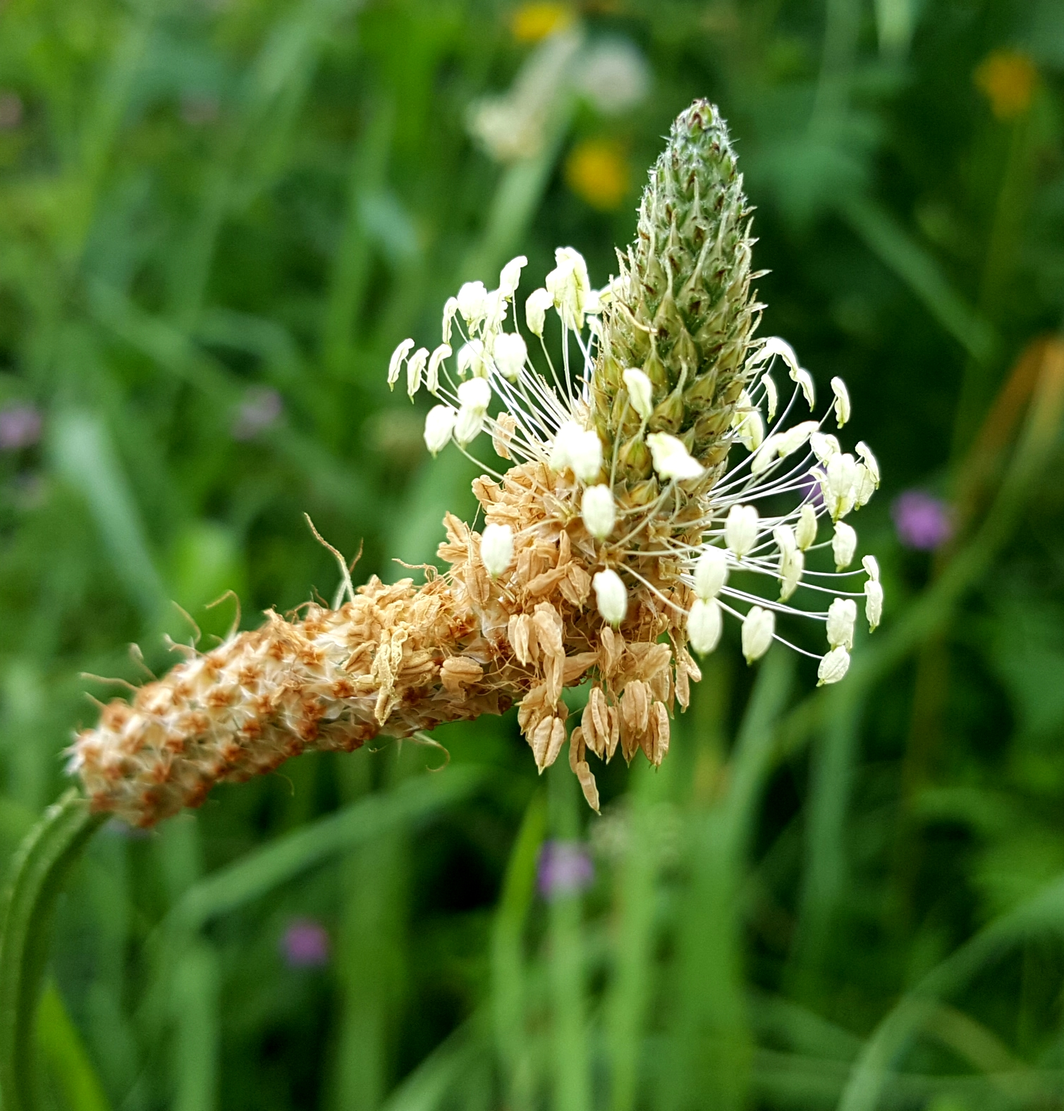 plantain ertainaren lorea Ulian